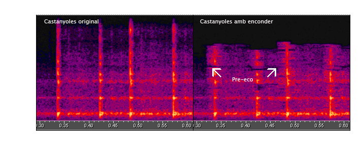 En la imatge podem veure l'espectre freqüencial de la gravació d'unes castanyoles. D'aquesta manera podem veure més clarament com hi ha una part de senyal que sona just abans del pic més fort(que es veu amb un color més clar i intens).